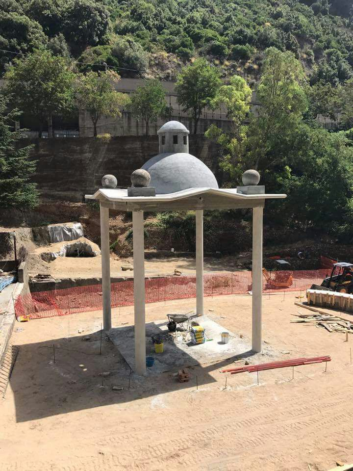 Costruzione nuova cappella del San Salvatore - Pazzano (RC) 23-07-2017